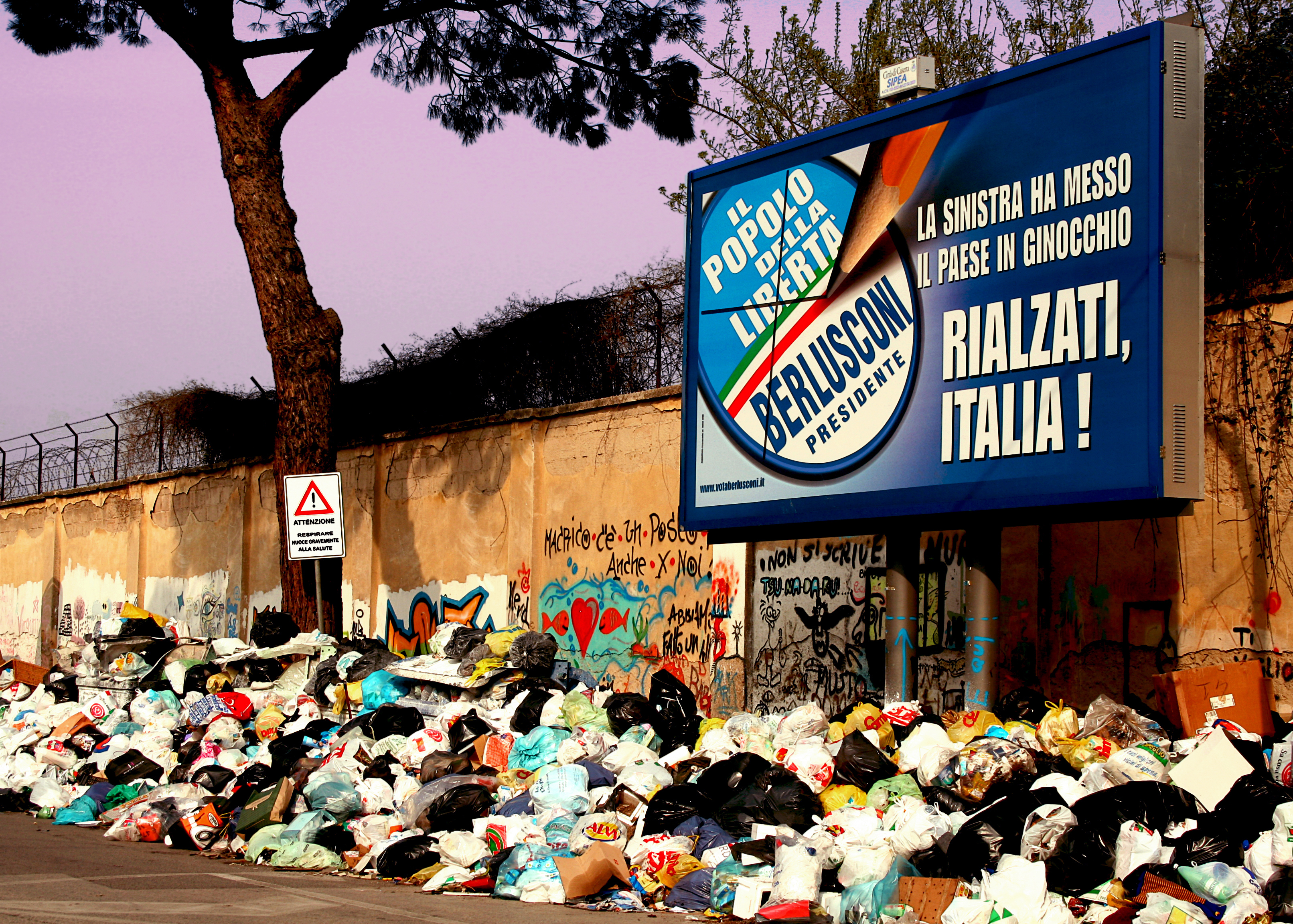 Emergenza rifiuti e Campagna elettorale 2008 - Manifesto PdL - Caserta.